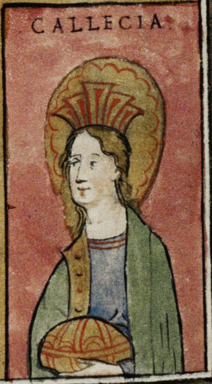 A Callecia na copia do Notitia Dignitatum de 1436 (fol. 148v).